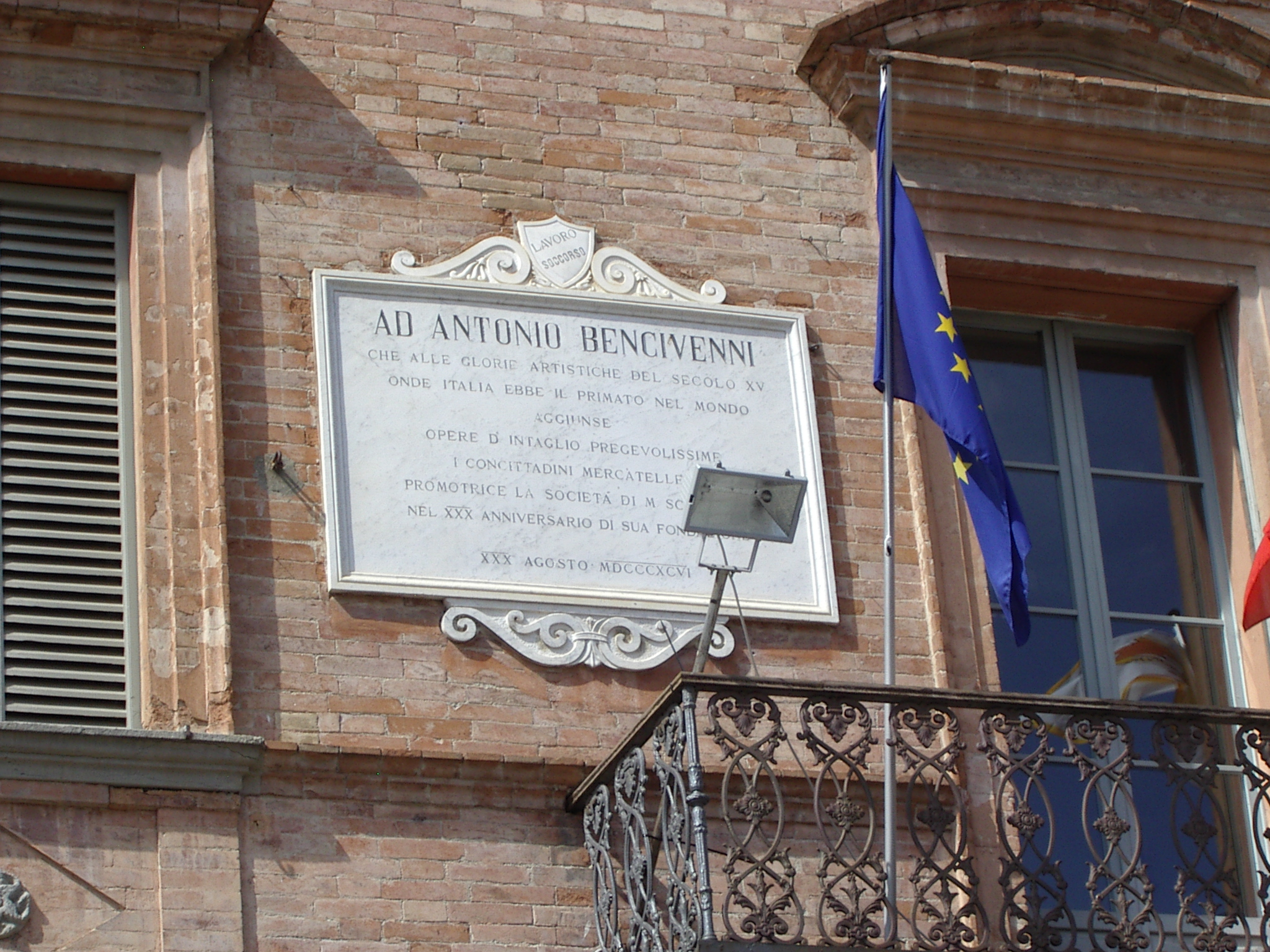 Plaque commémorative à Antonio Bencivenni Mercatello sul Metauro Marches Italie